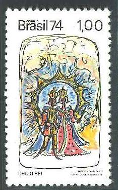 Emissão comemorativa dos Correios, realizada em Fevereiro de 1974, para divulgação das Lendas Brasileiras